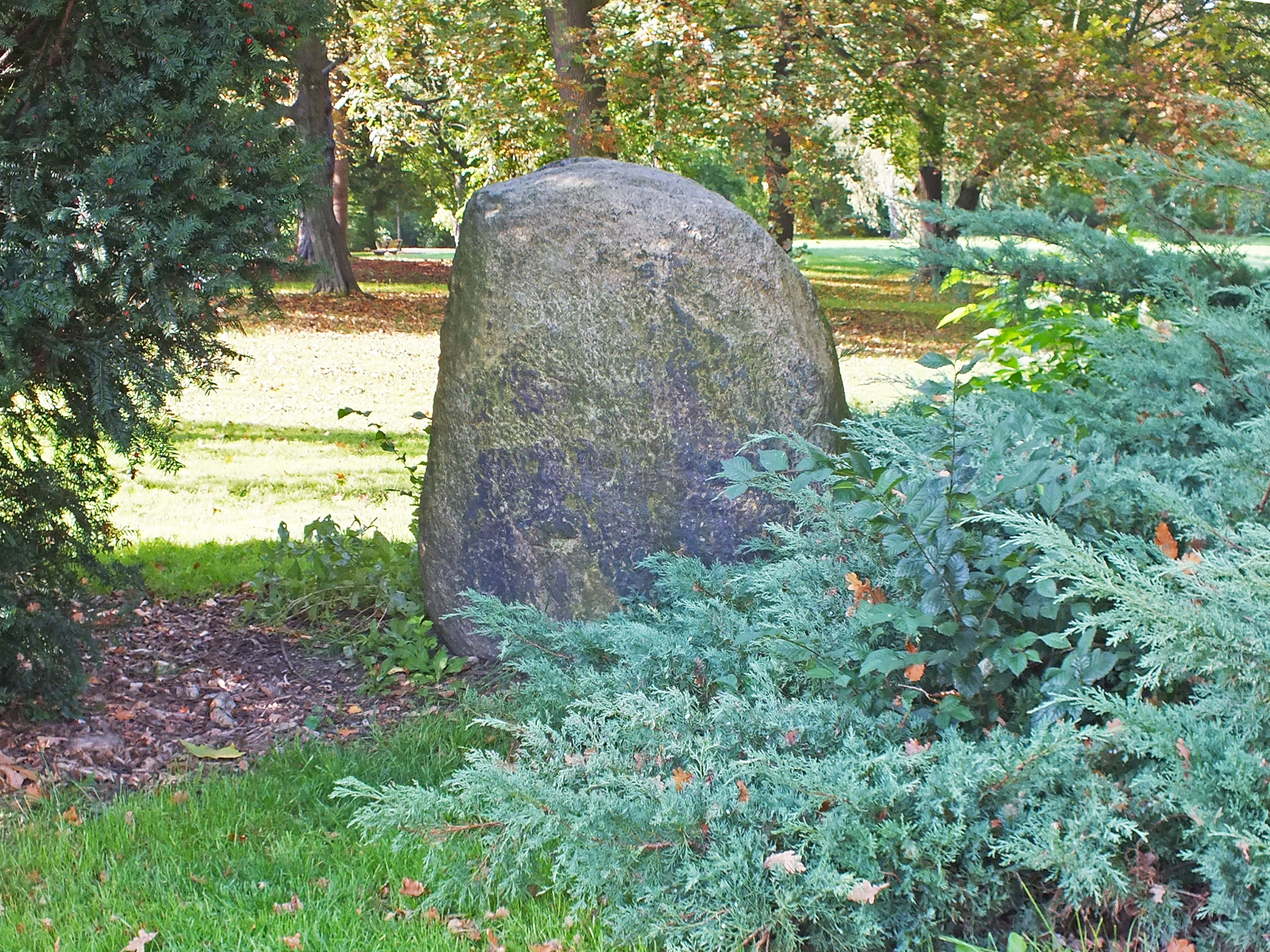 Der sogenannte Kolonialstein in den Grünanlagen am Völkerschlachtdenkmal in Leipzig. Die Inschrift „Deutsche Gedenkt Eurer Kolonien“ wurde nach dem Zweiten Weltkrieg beseitigt.